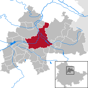 Sömmerda in Thuringia - District Sömmerda